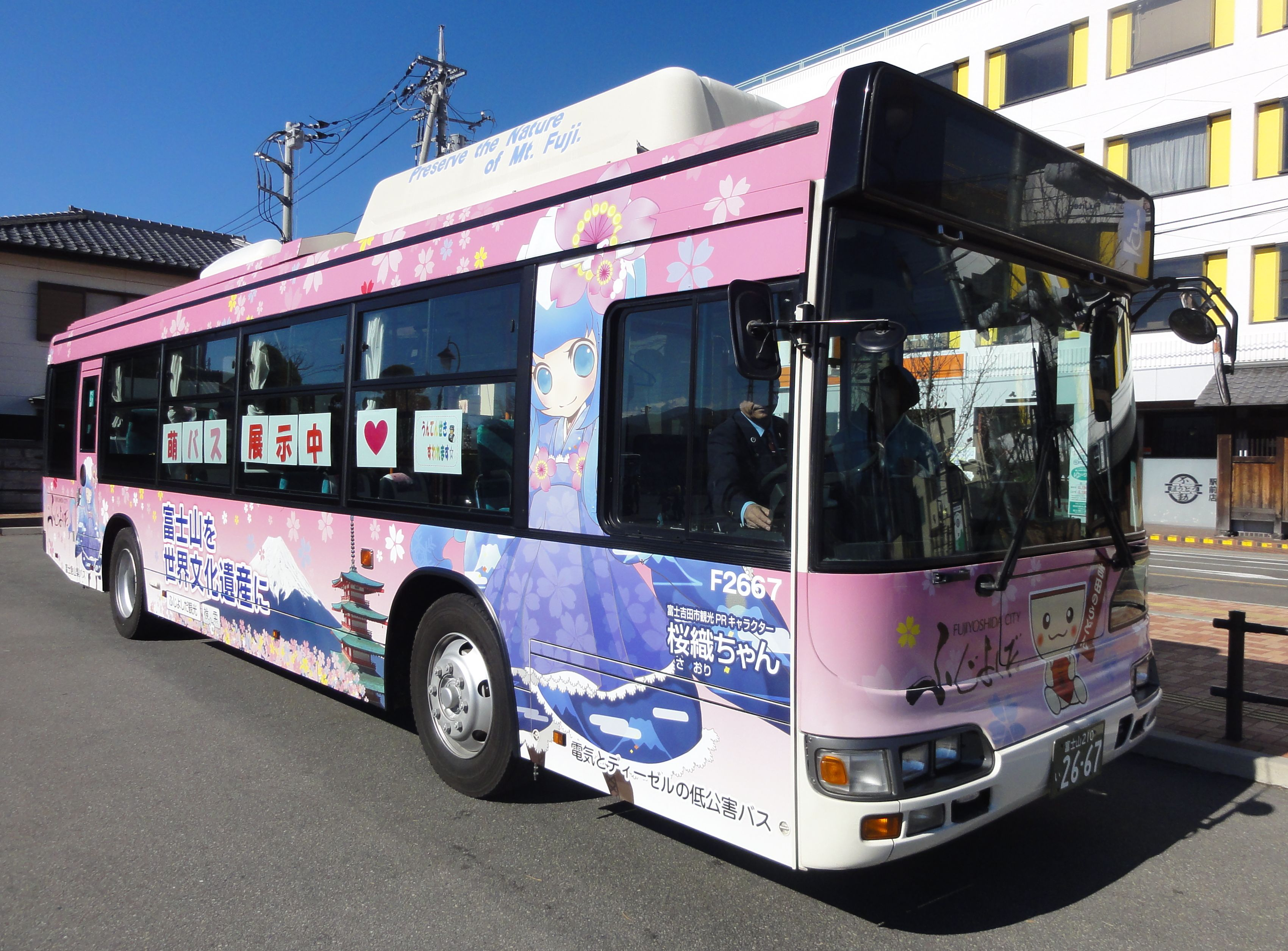 富士急山梨バス 桜織ちゃん ラッピングバス